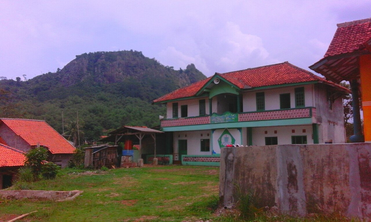 Photo Pesantren Raudhotul Hikmah Putra Kp Cirogok Desa Anjun Kabupaten Purwakarta berlatarkan panorama Gunung Cupu